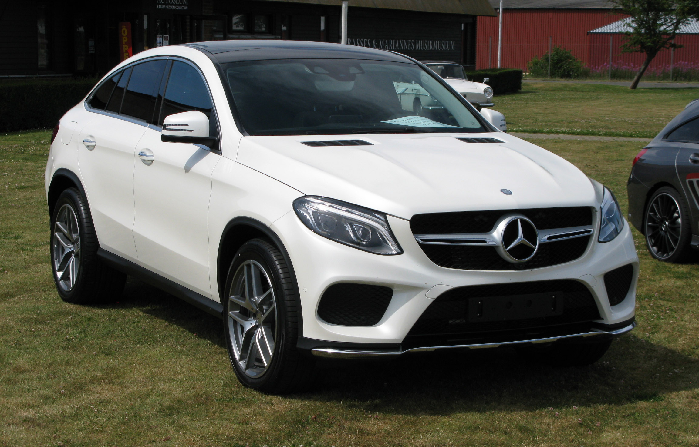 Mercedes-Benz GLE350d Coupé